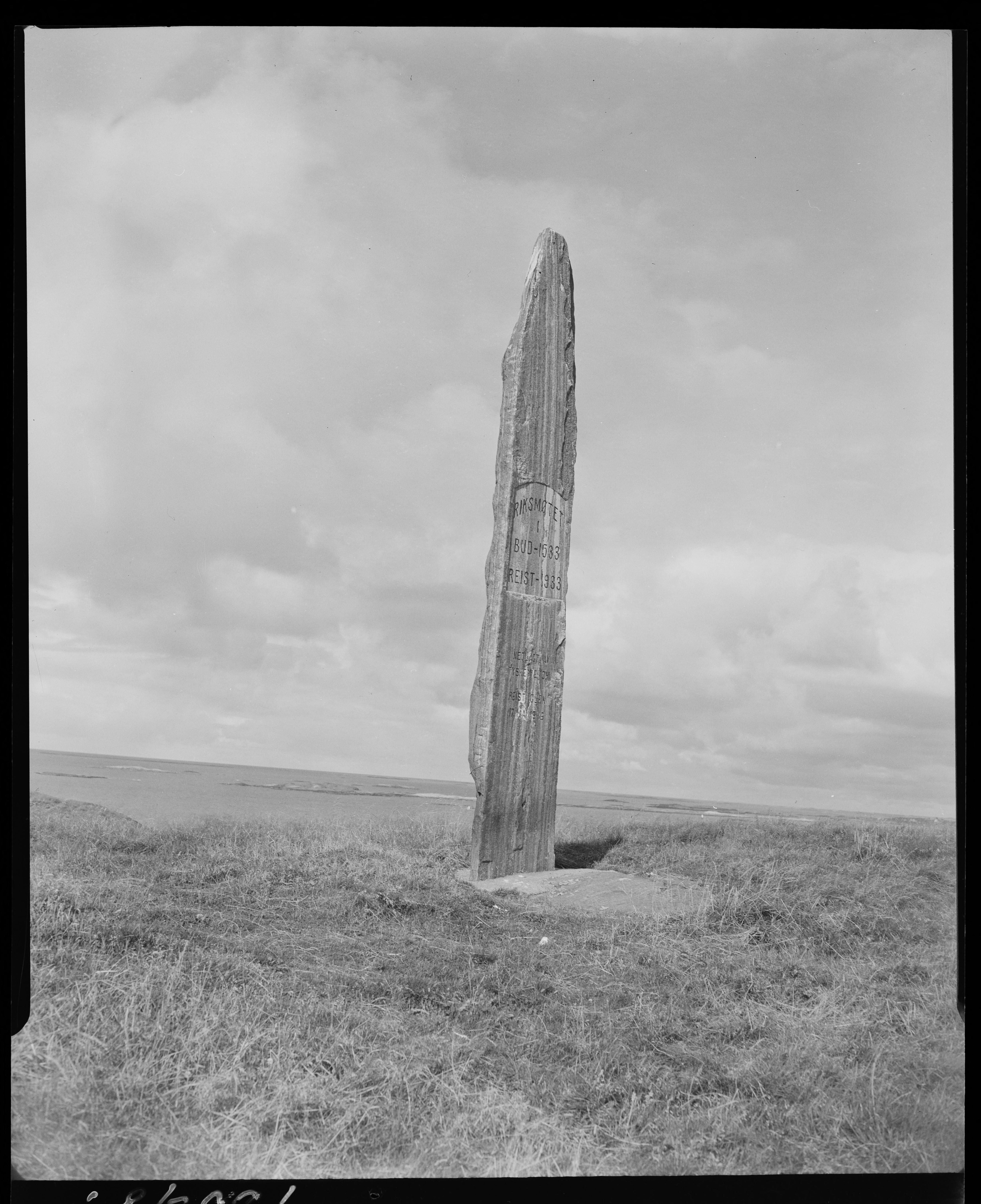 Bildet er hentet fra Nasjonalbibliotekets bildesamling. Anmerkninger til bildet var: fotograf :ukjent Bud, Fræna, Møre og Romsdal